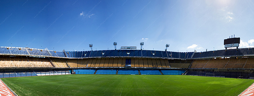 La Bombonera